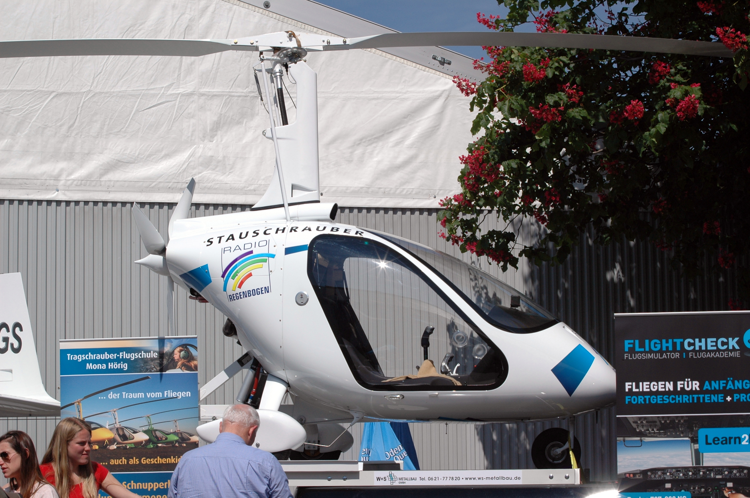 Der Stauschrauber link